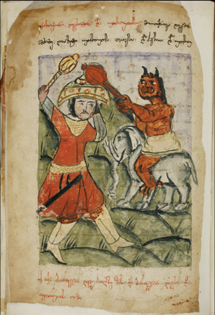 უთრუთიან-საამიანი (S-1594)